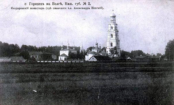 Фёдоровский монастырь в Городце